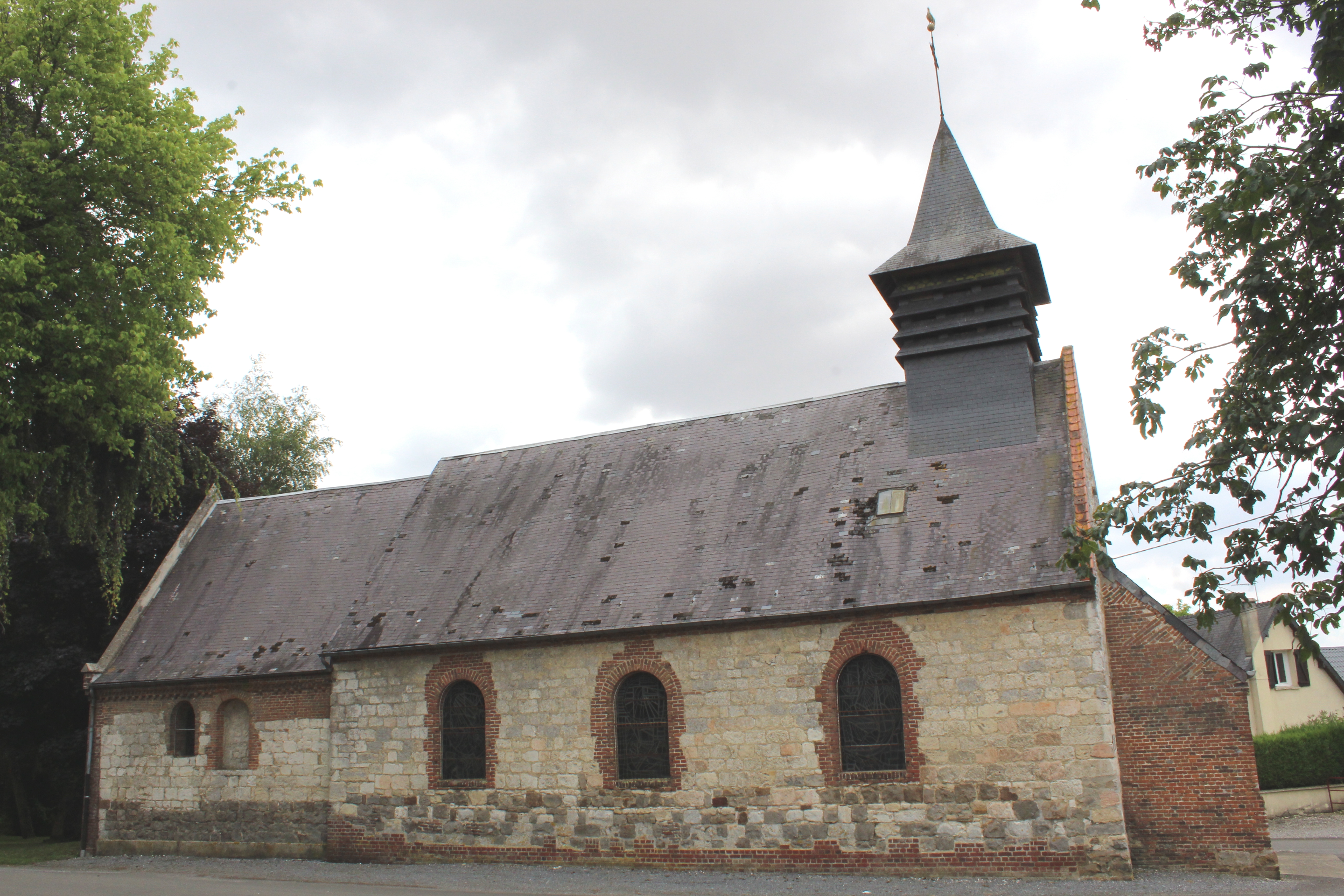 L'église